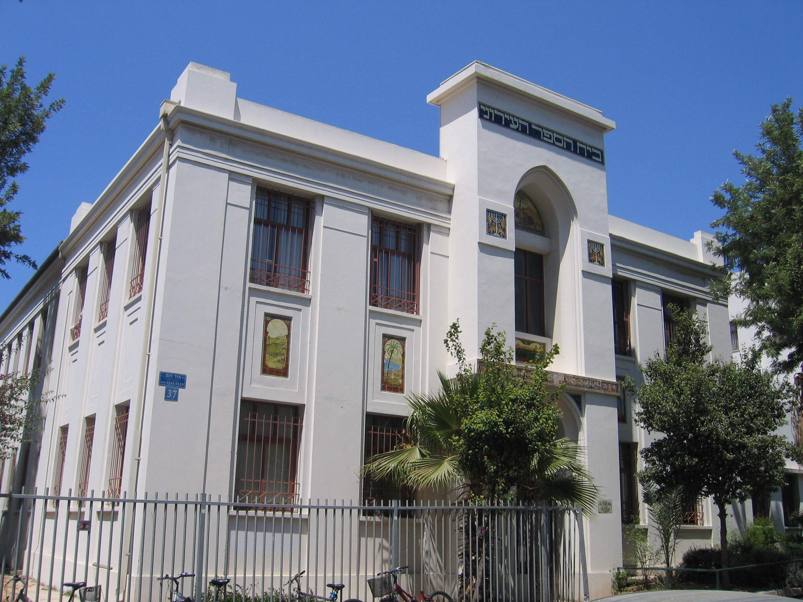 Ehad haam school (1924), Ehad Haam street, Tel Aviv-Yaffo